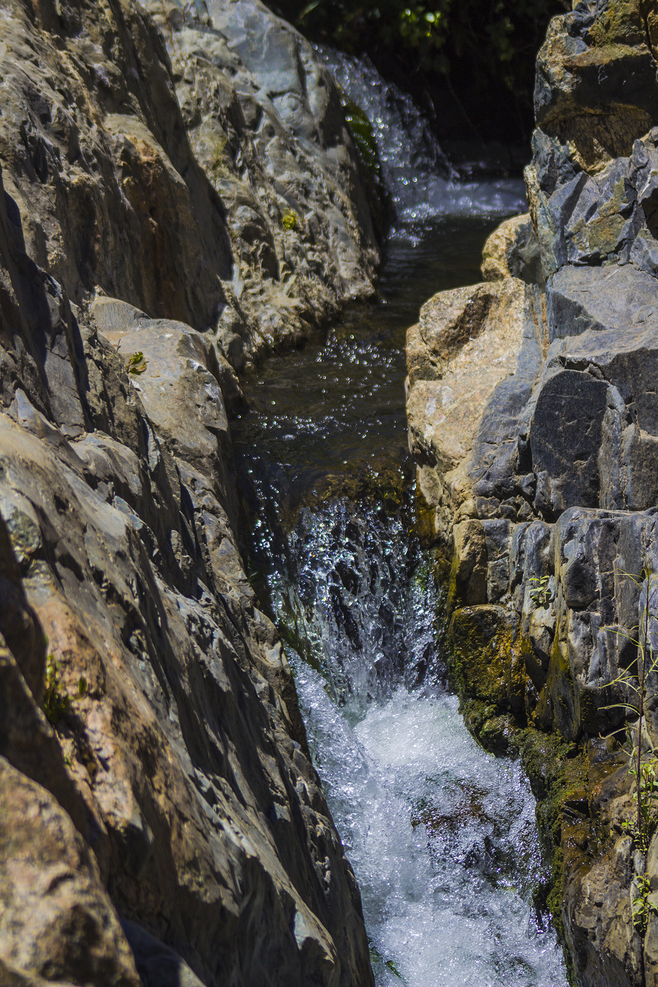 Caudal estero de Reñaca, en la zona de la Poza de la Virgen, Parque Natural Gómez Carreño, Viña del Mar, Chile.